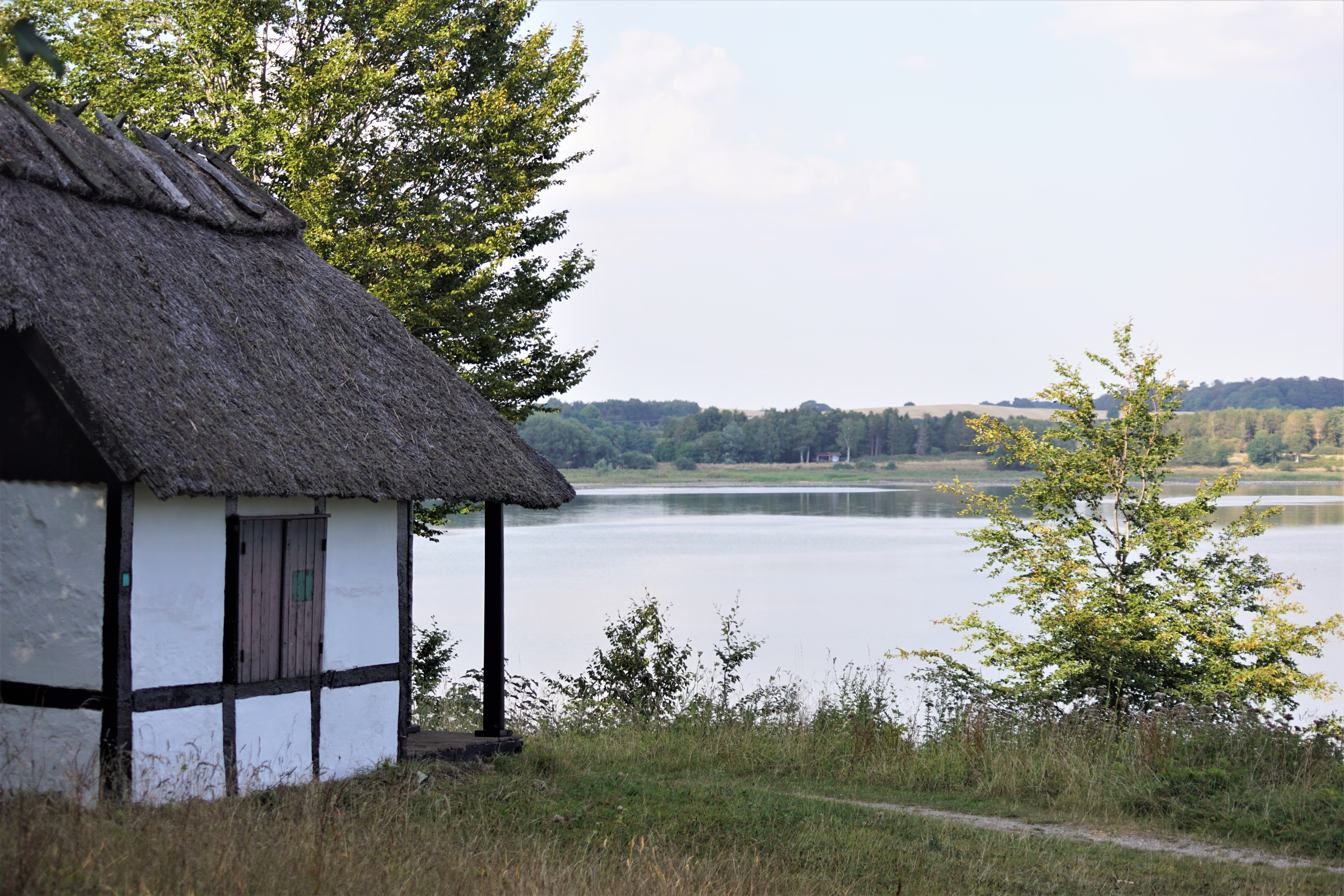 Pavillion ved kilden